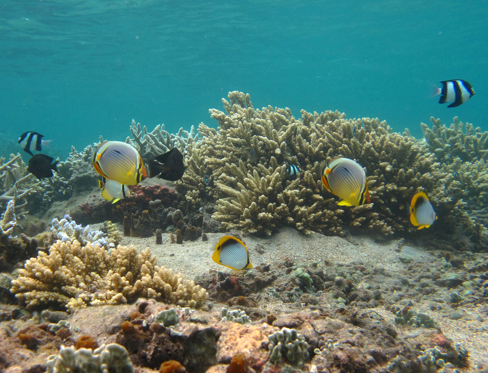 Photographie sous-marine du lagon de l'Ermitage, à la Réunion. On y voit : Dascyllus aruanus, Ctenochaetus striatus, Chaetodon trifasciatus, Chaetodon trifascialis et Chaetodon melannotus